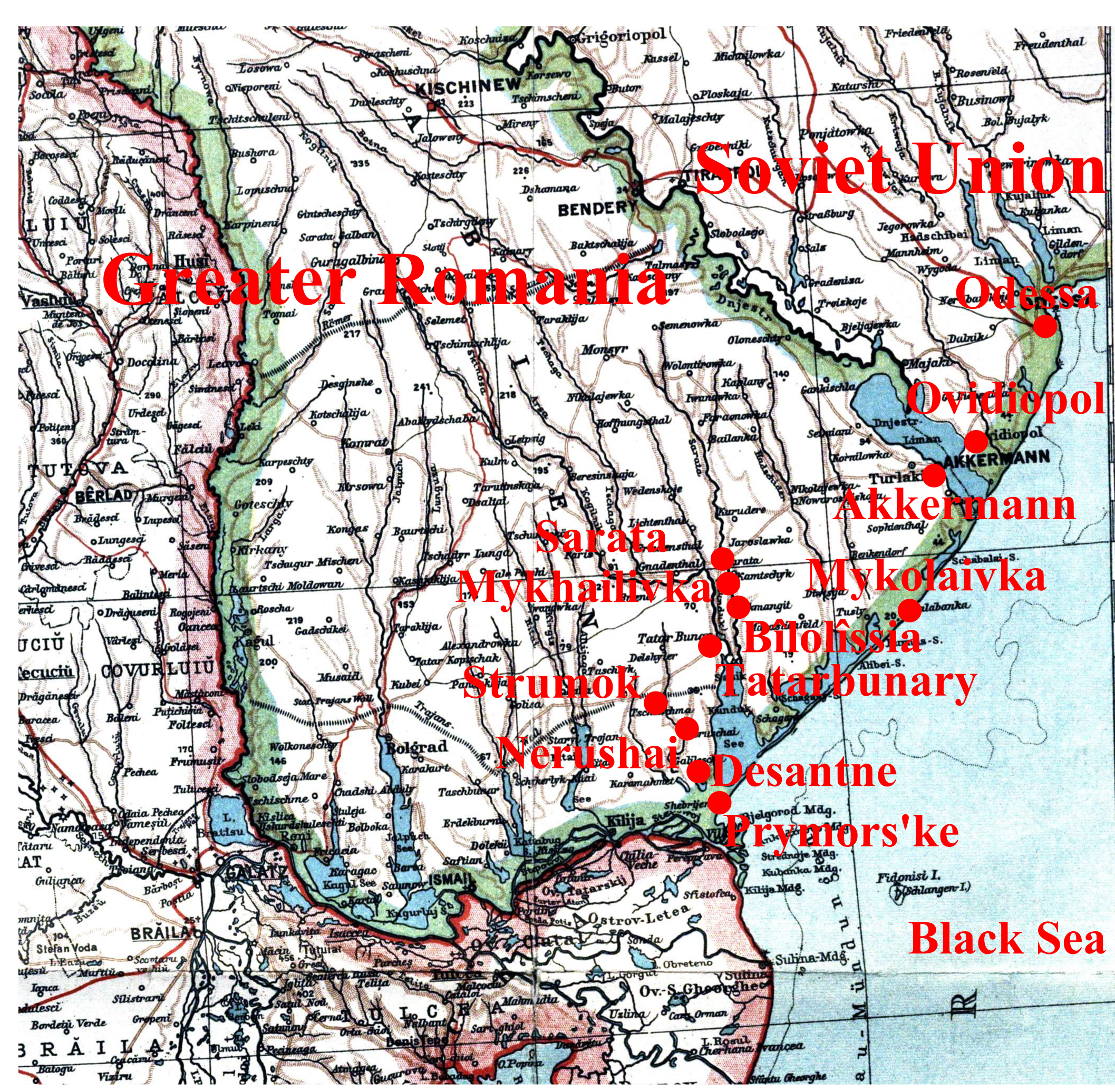 Locatiile revoltelor de la Tatar-Bunar